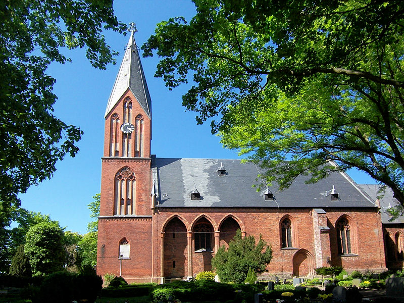 Kirche in Prohn, Mecklenburg-Vorpommern